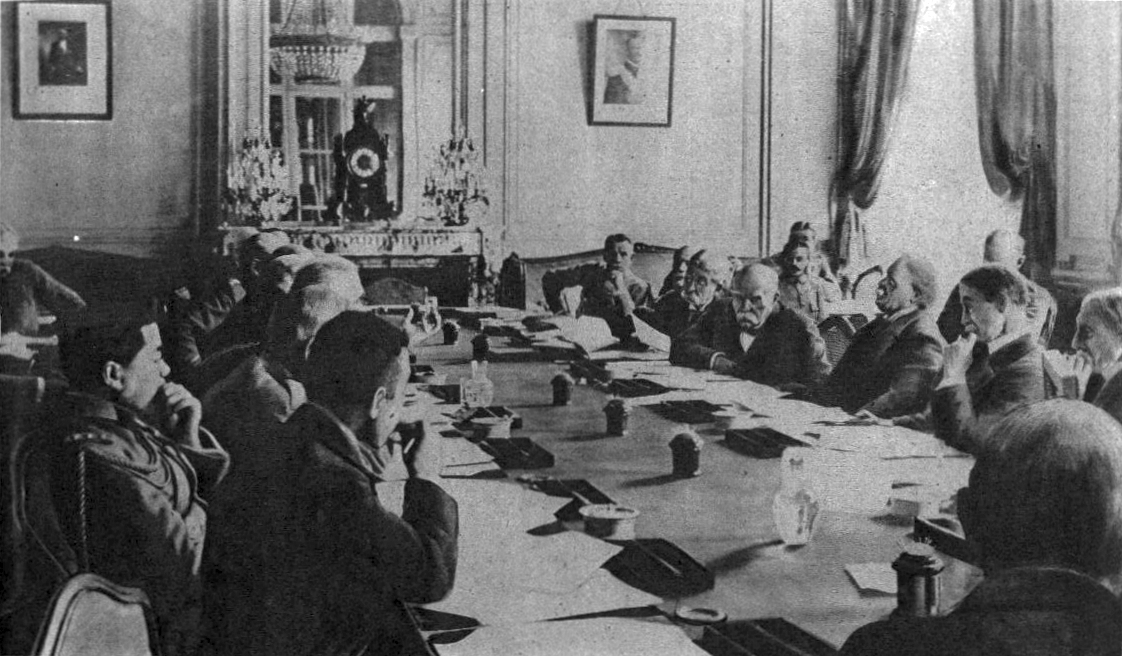 La conférence de_Versailles : à gauche d'avant vers le fonr d :_Nagaï, di_Robiland,Sonnino,_Orlando,_House,_Bliss,_Archin_Closs,_Venizelos,_Vesnitch; à droite du fond vers l'avant :_Belin,_Foch,_Pichon,_Clémenceau,_Lyod_George,_Bonar_Law et Milner.